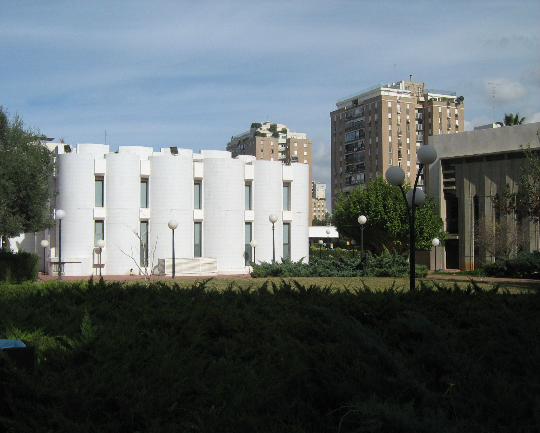 בתי הכנסת בנווה אביבים